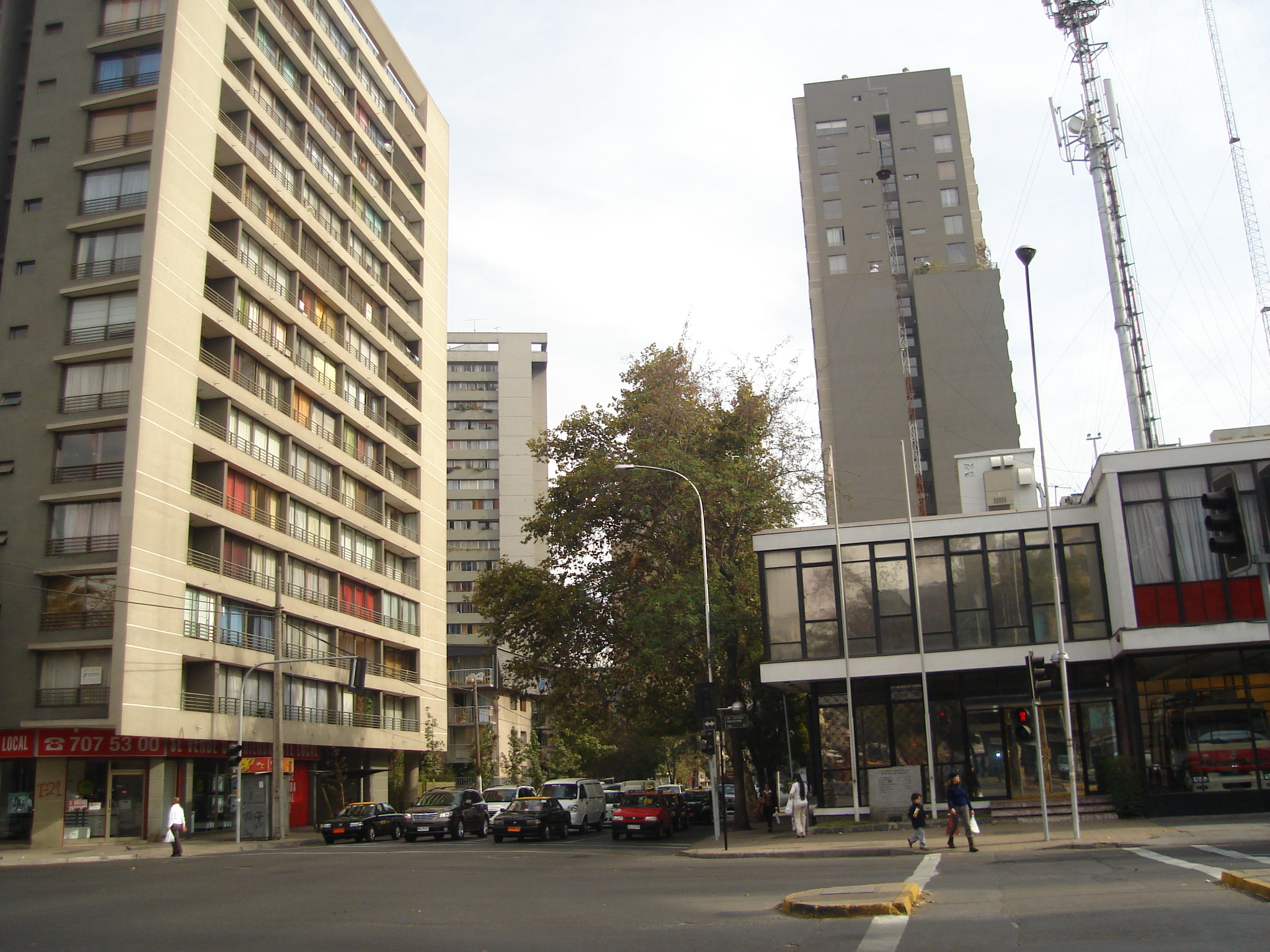 Intersección calles Diagonal Paraguay y Vicuña Mackenna en Santiago de Chile.